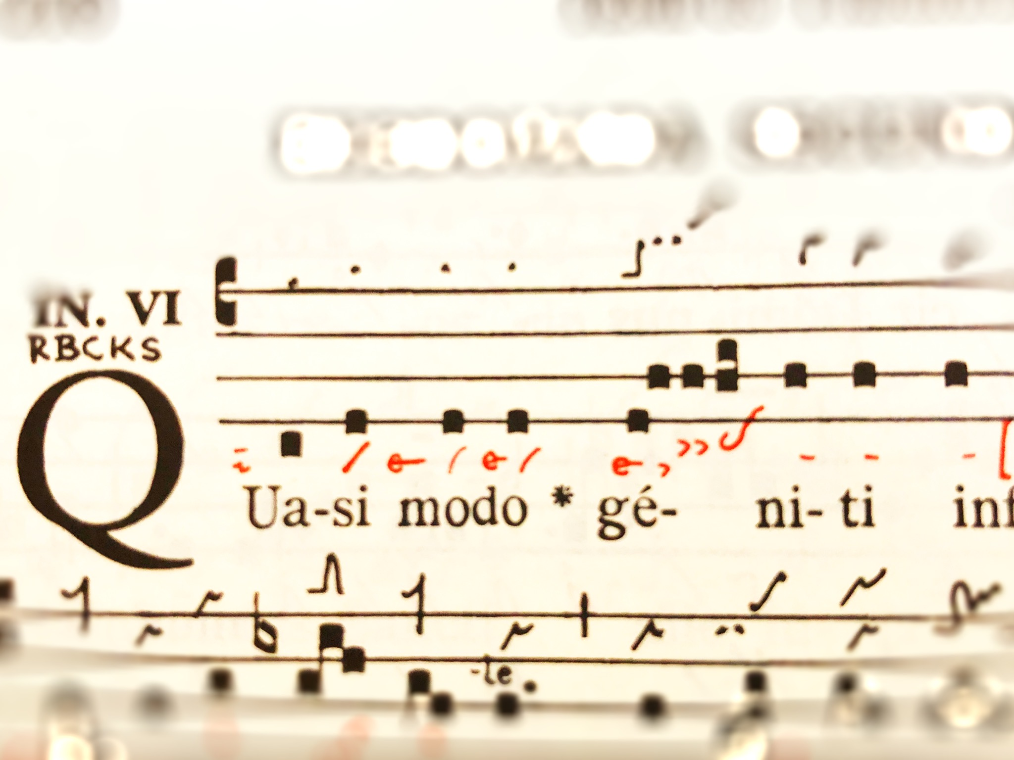 Beginning of the Introitus Quasi modo